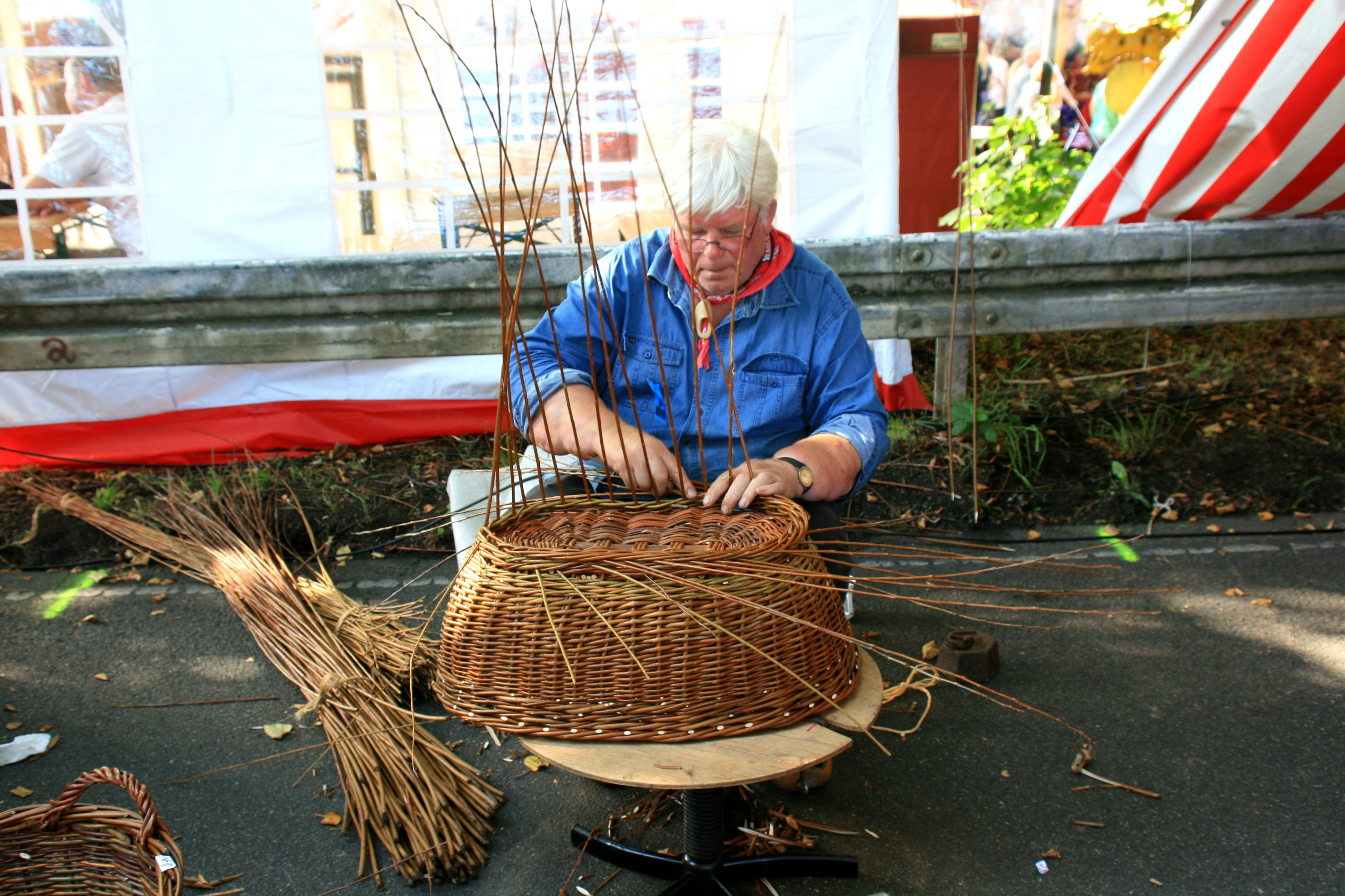 Markfelder Straße beim Kanalfestival 2011 in Datteln